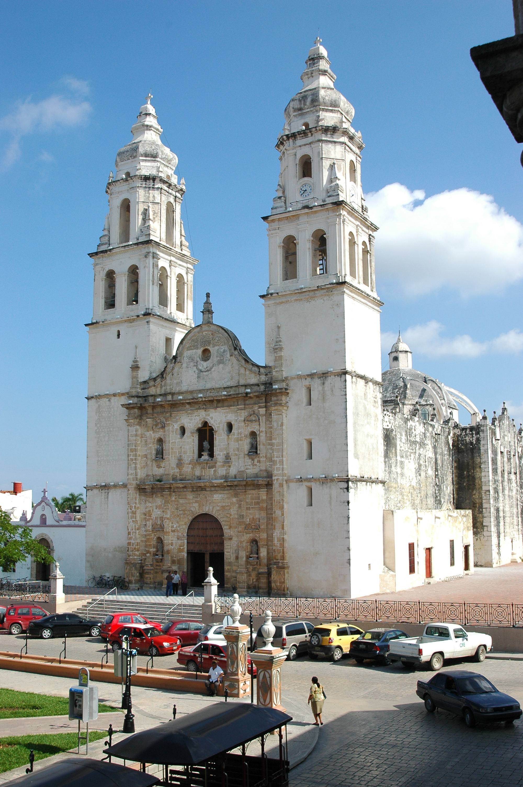 Centro Histórico de San Francisco de Campeche.